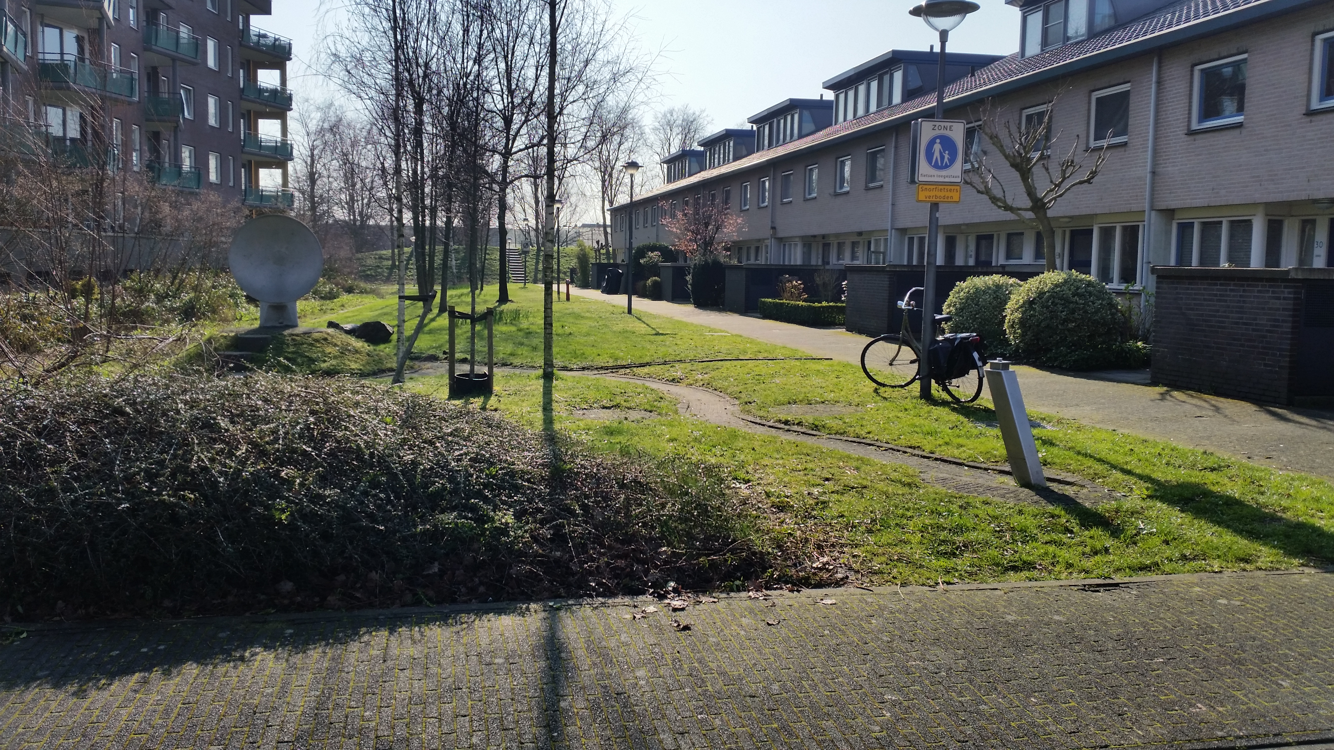 Twee betonnen satellietontvangers en een waterstroompje nabij de Praterlaan/Bernabeuhof, Watergraafsmeer